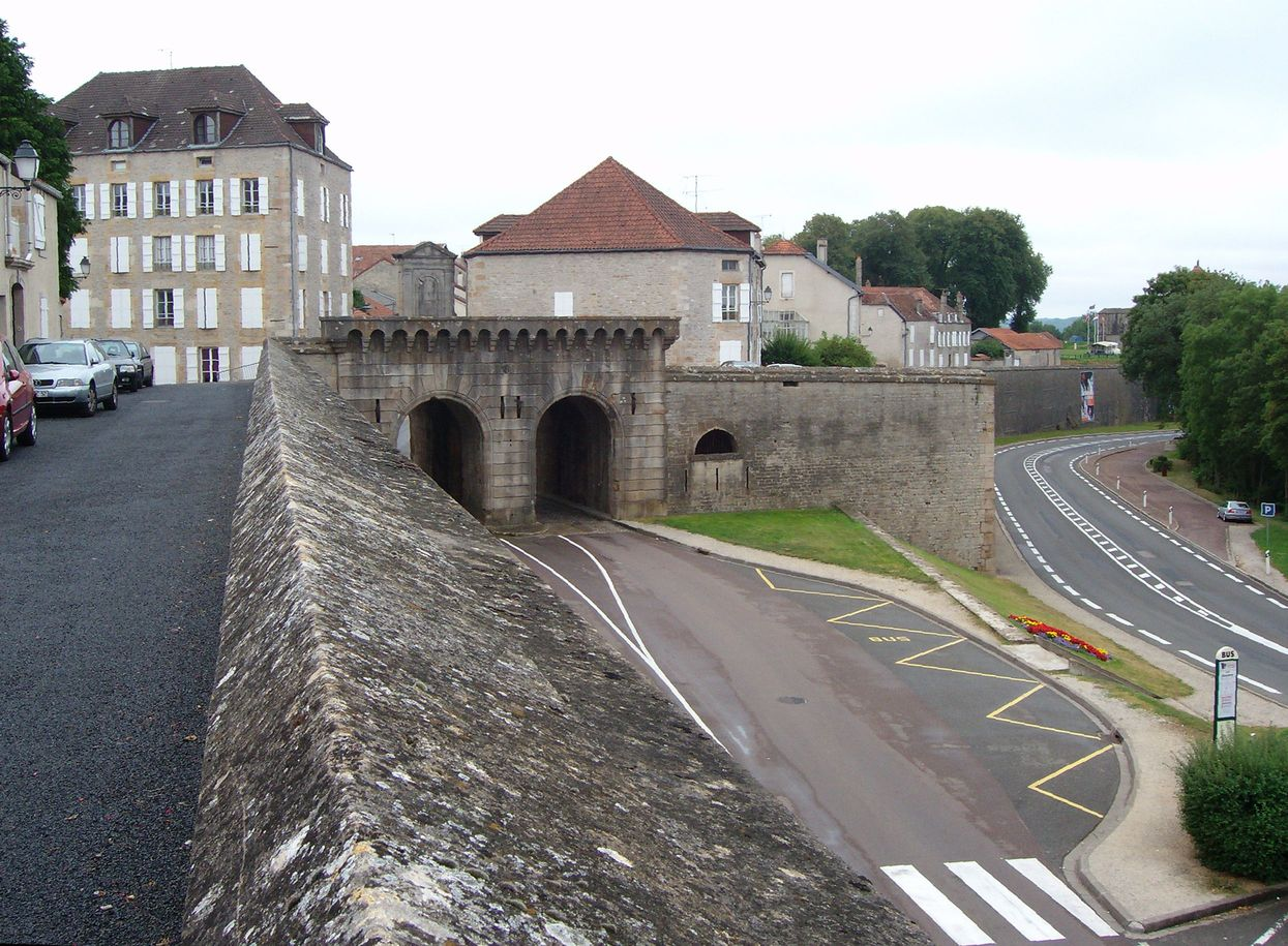 Langres, Porte-Neuve aussi appellée Porte des Terreaux Langres